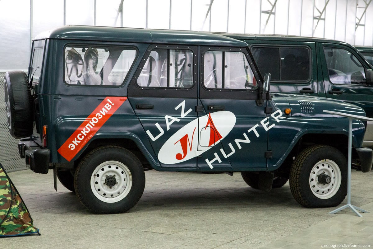 УАЗ Хантер (УАЗ-315195) с номером 000001. Выставочный павильон-музей УАЗа.